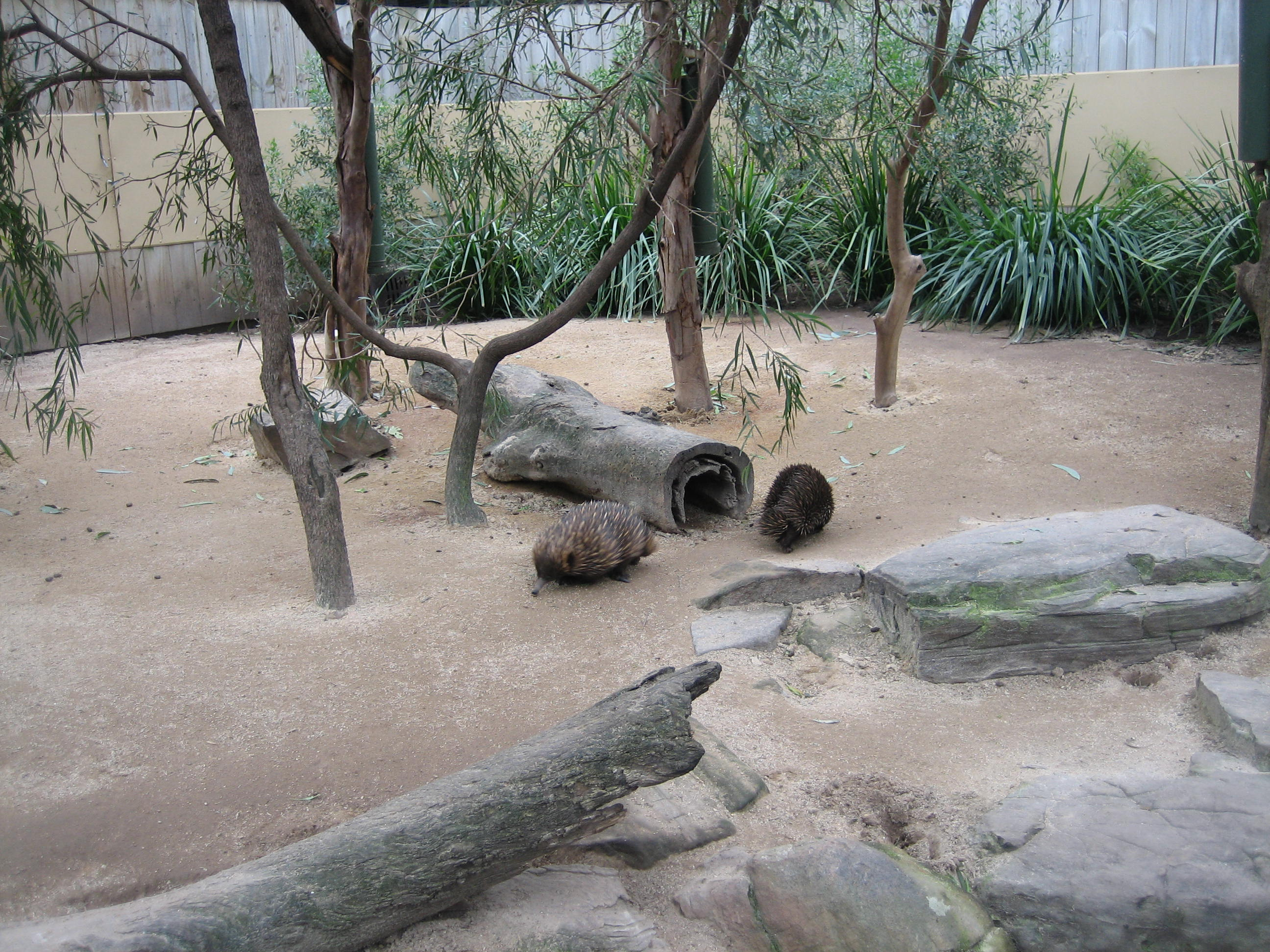 Tachyglossus aculeatus no Zoológico de Adelaide (detalhe para o ambiente em cativeiro)